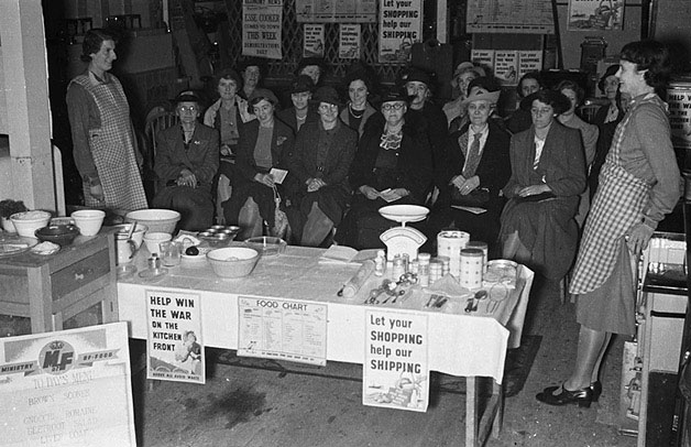 Teitl Cymraeg/Welsh title: Arddangosiad bwyd a choginio cyfnod y rhyfel yn siop nwyddau haearn D. R. Davies, Y Drenewydd Cyfrwng/Medium: Negydd ffilm / Film negative Cyfeiriad/Reference: (gcc02388) Rhif cofnod / Record no.: 3472409 Rhagor o wybodaeth am gasgliad Geoff Charles yn Llyfrgell Genedlaethol Cymru Ceir mwy o ffotograffau o Gymru a'r Gororau adeg yr Ail Ryfel Byd ar wefan .uk More information about the Geoff Charles Collection at the National Library of Wales More photographs of Wales and the English border during the Second World War can be found at .uk